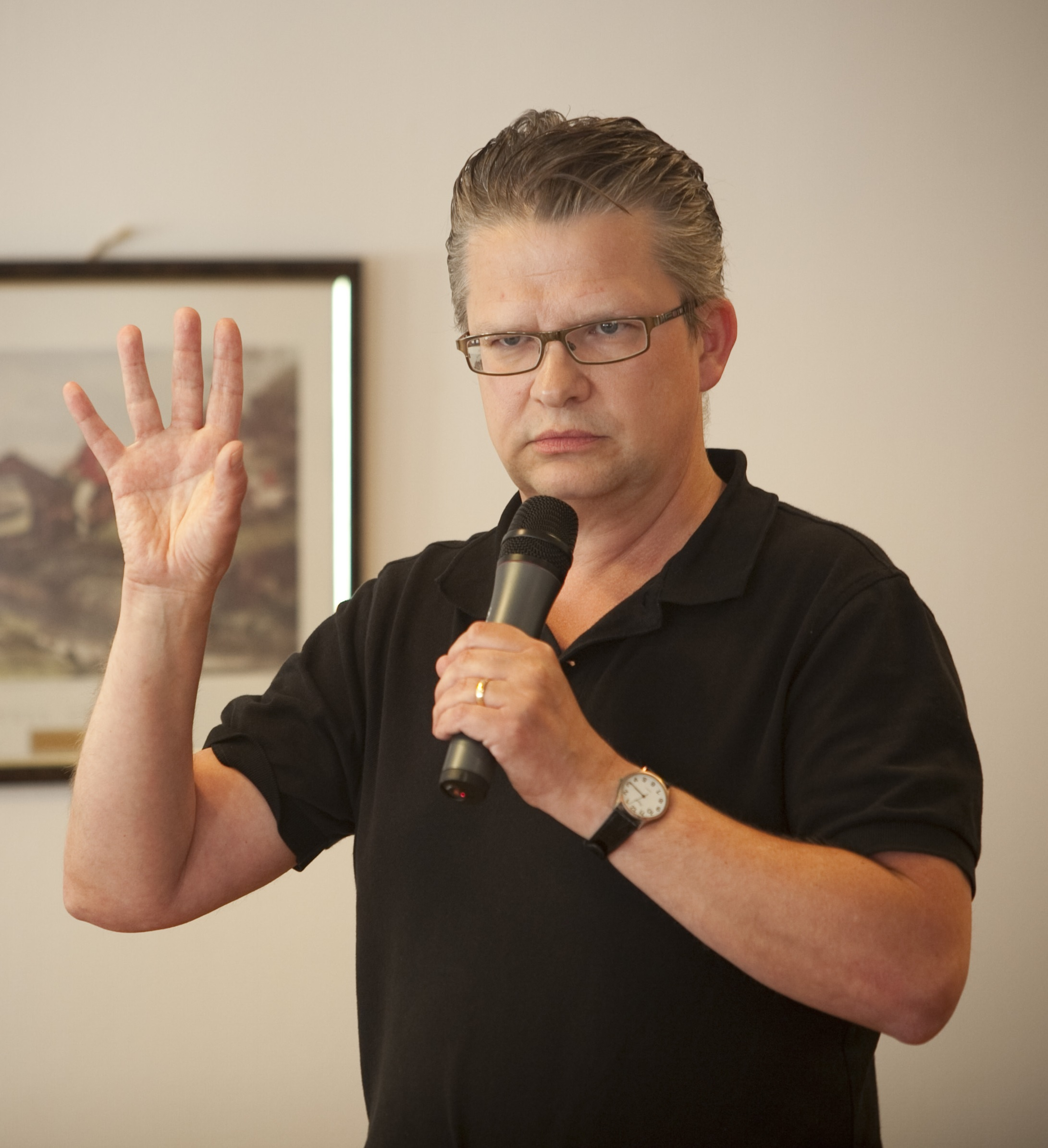 Skådespelaren och programledaren Benny Haag vid Actavis seminarium under Almedalsveckan i Visby 2010.